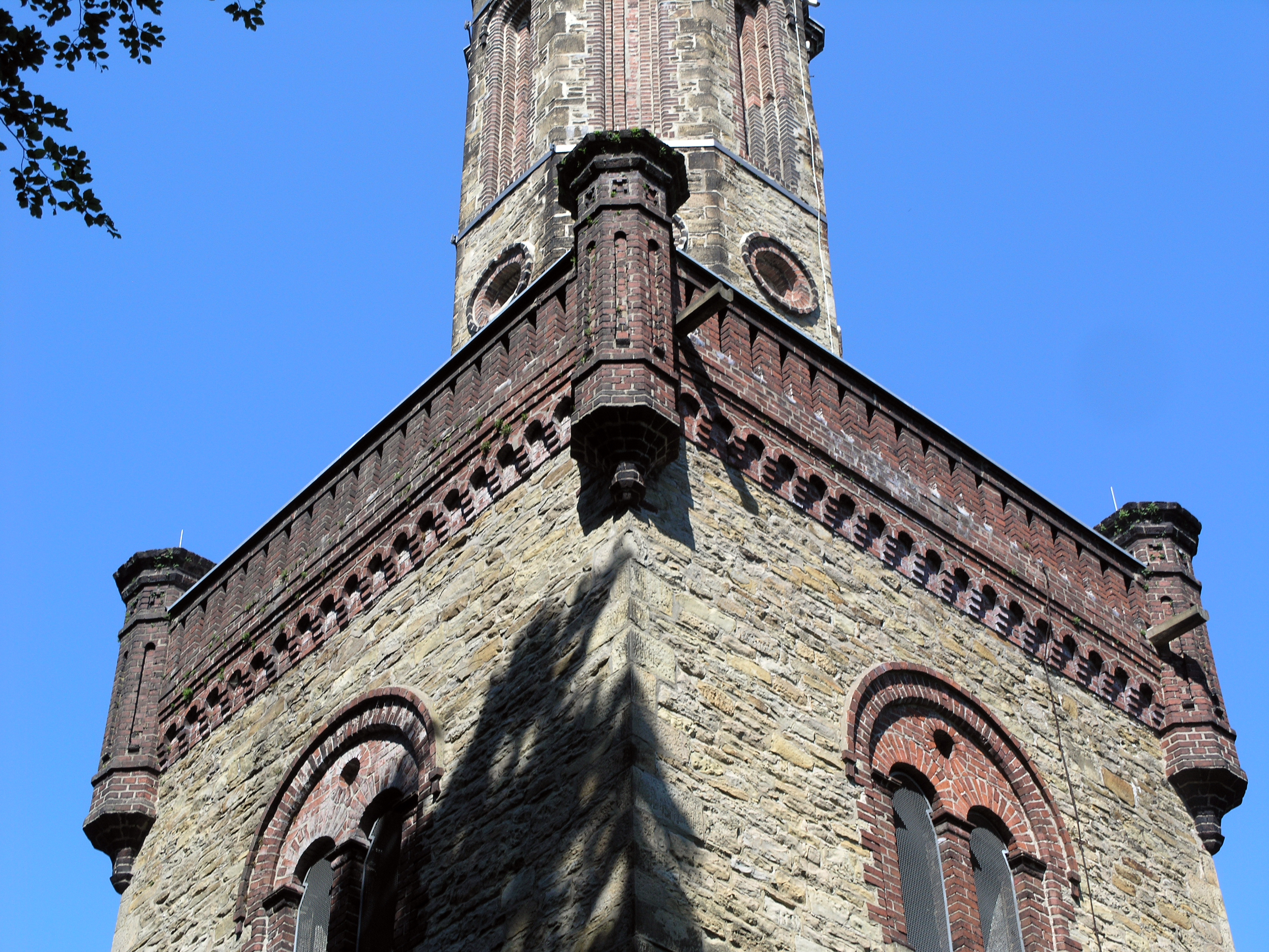 Северный Рейн-Вестфалия, Хаген - гора Кайсберг, башня барона фом Штейна